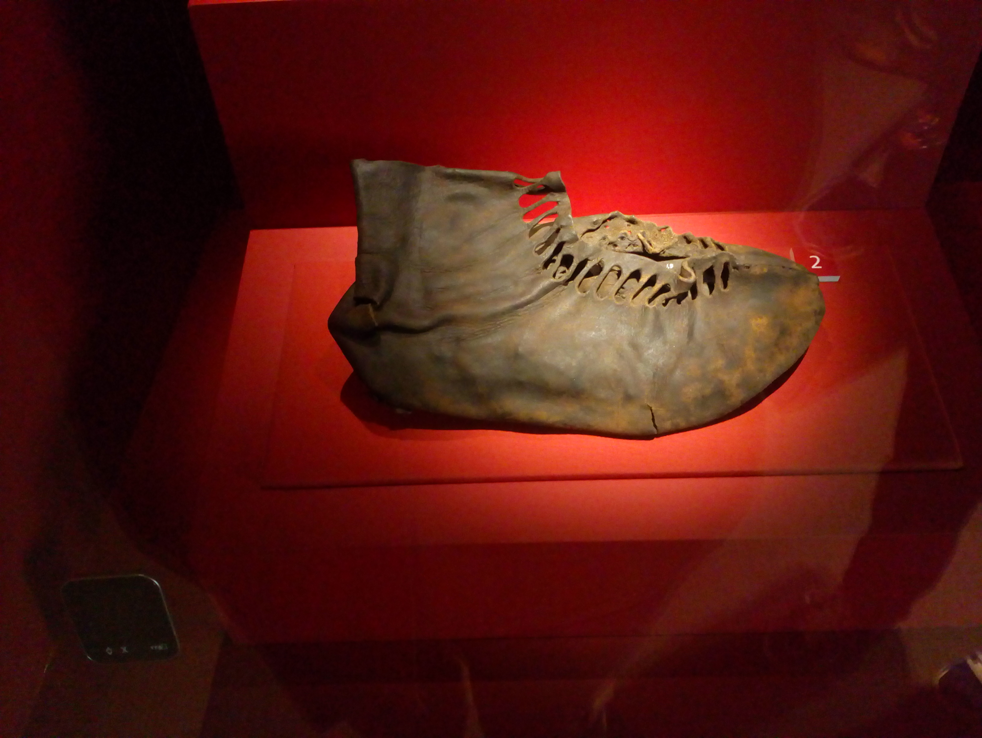 Vindolanda 2017